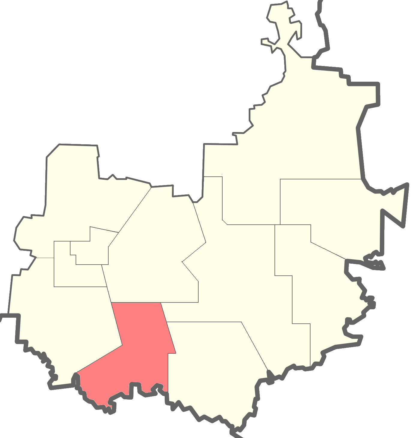 Анісімовське сільське поселення: Анісімовське сільське поселення